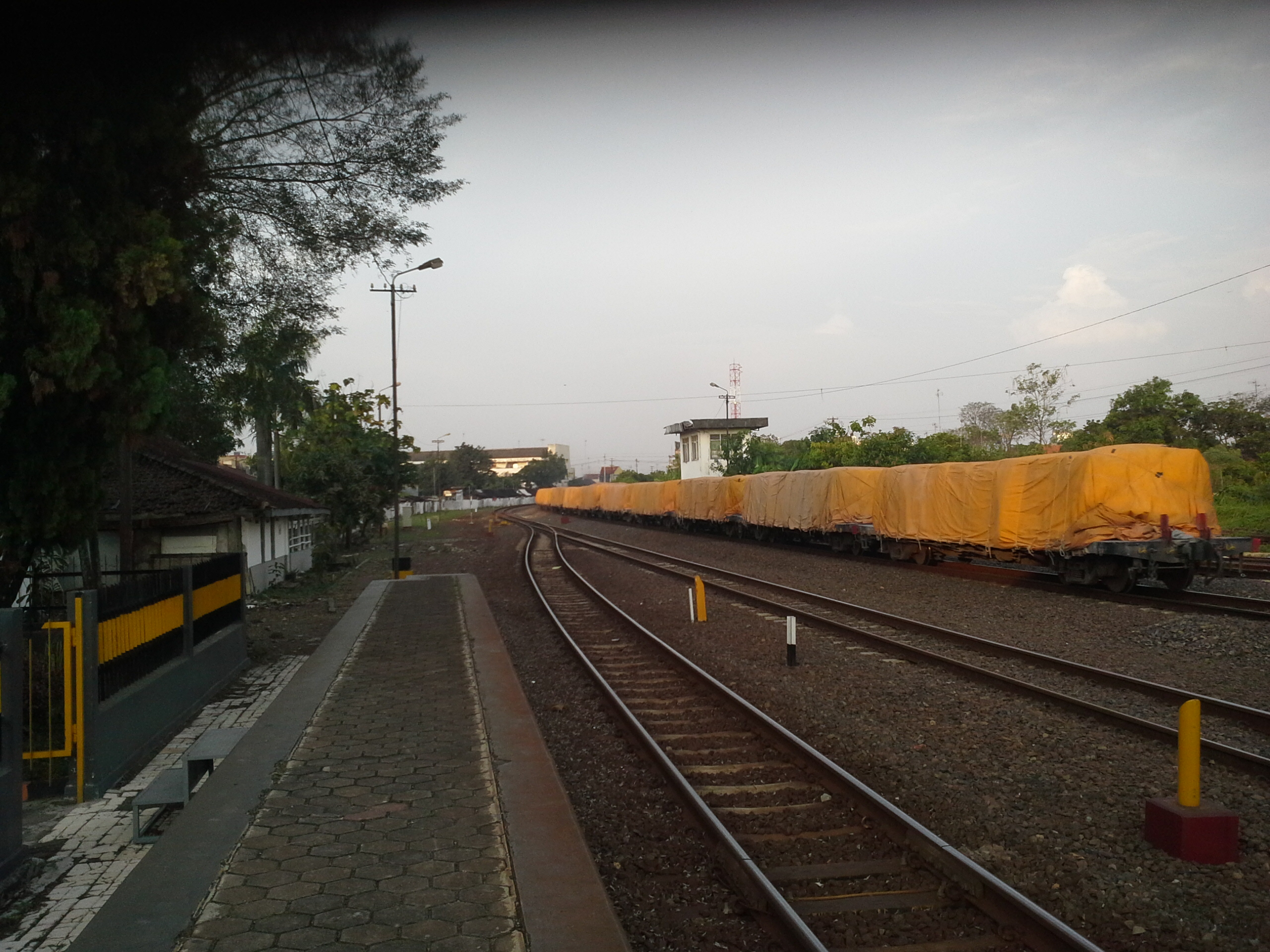 Kereta api Semen Nambo-Kalimas pp melintas langsung Stasiun Pekalongan, Jawa Tengah, Indonesia